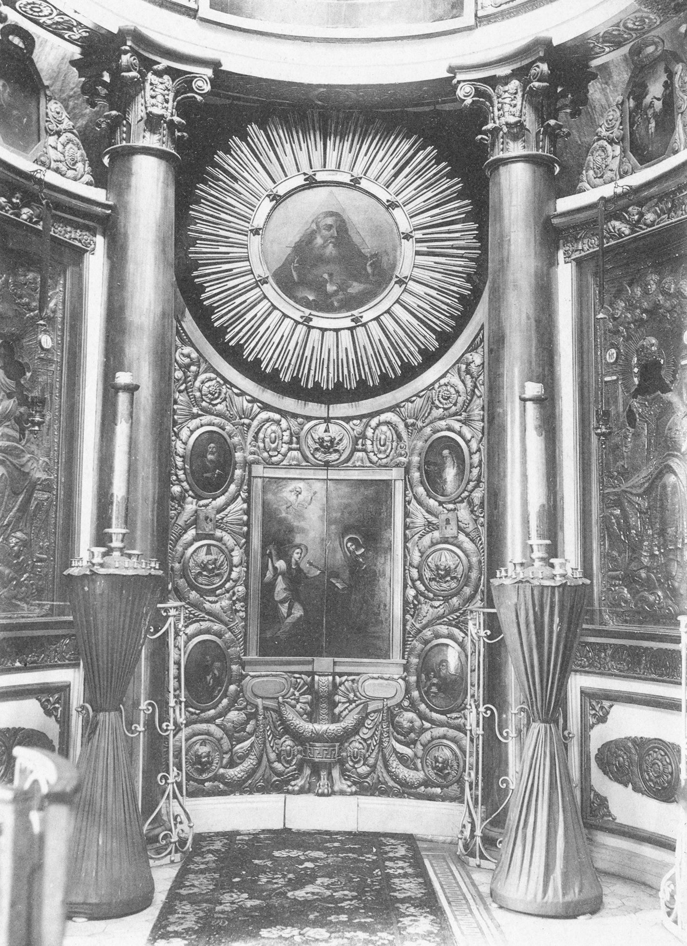 Москва Царские врата храма Усекновения главы Иоанна Предтечи в Казенной слободе